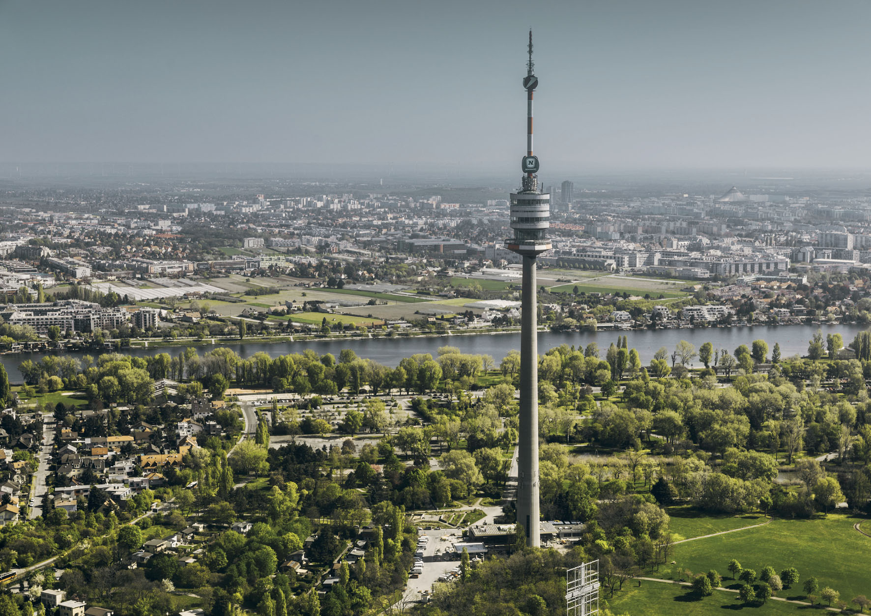 Donauturm